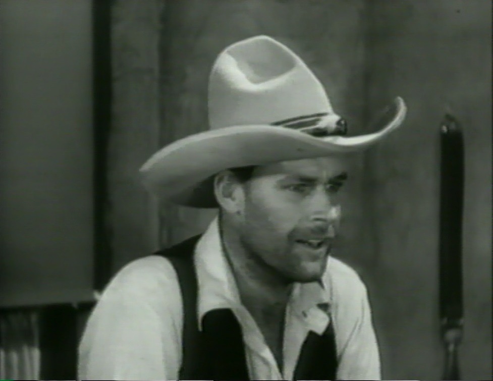 El actor estadounidense Lane Chandler en una escena de la película El camino de Sagebrush.